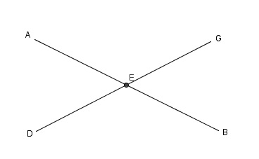 Il·lustració d'una de les proposiciones de les Data d'Euclides